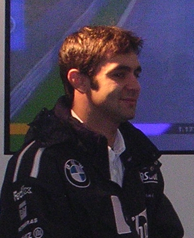 L'autodromo nazionale di Monza durante la gara del settembre 2004 Eng: The Autrodomo Nazionale of Monza (italy) during a race in september 2004